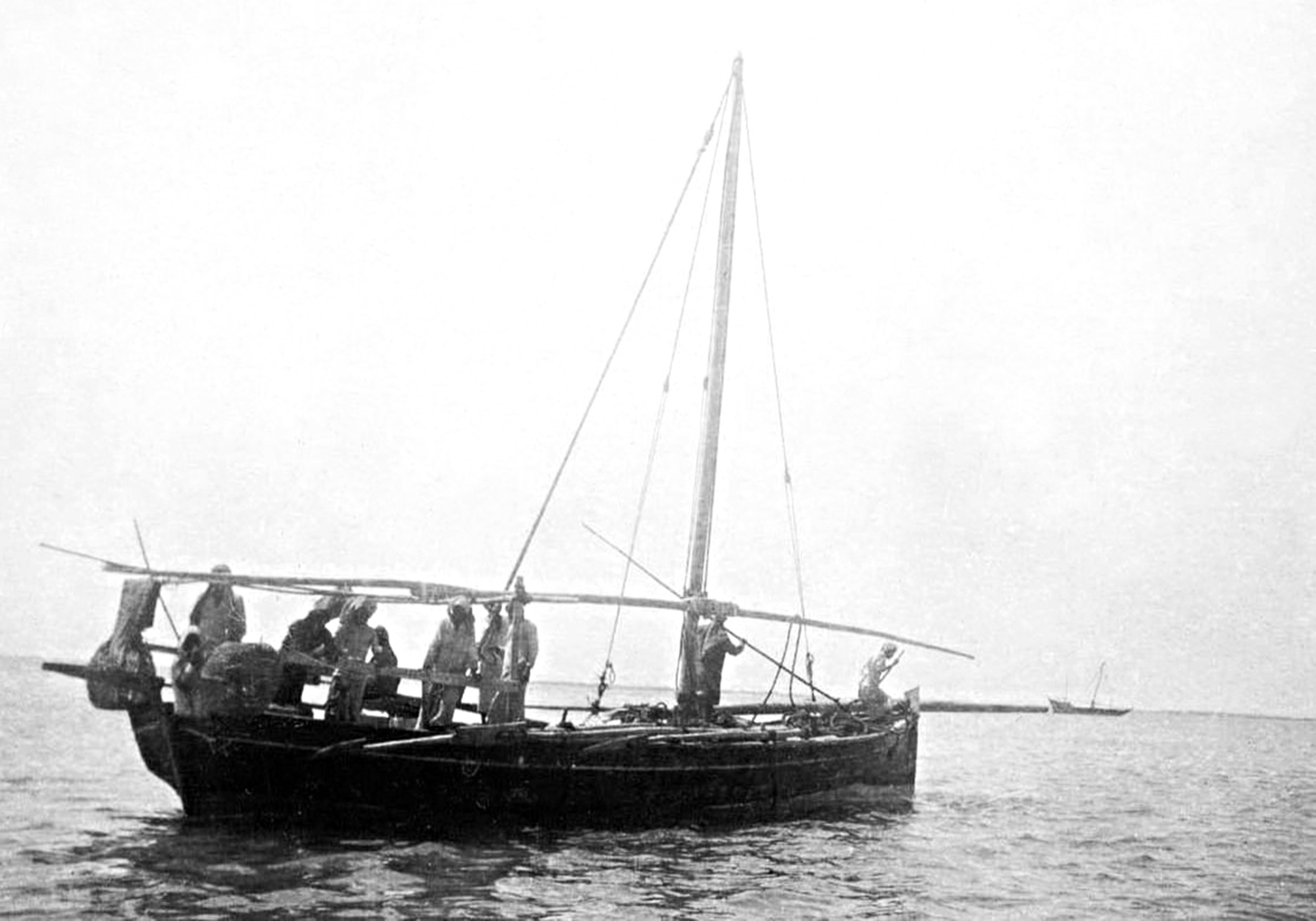 قارب صيد وطواشة في المحرق.